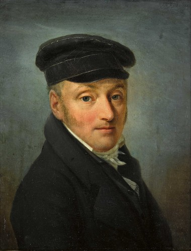 Bildnis Ludwig Zeerleder (1772-1840), Bankier, Politiker, Besitzer des Neuen Schlosses Belp.